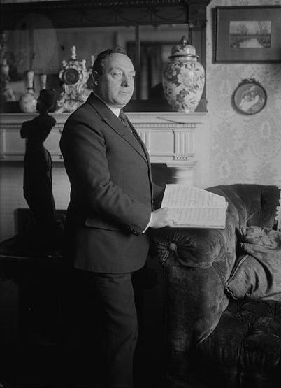 Giuseppe de Luca (1876 – 1950), Italian baritone